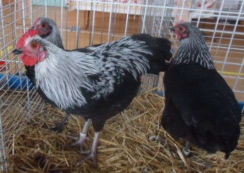 Trio argentés